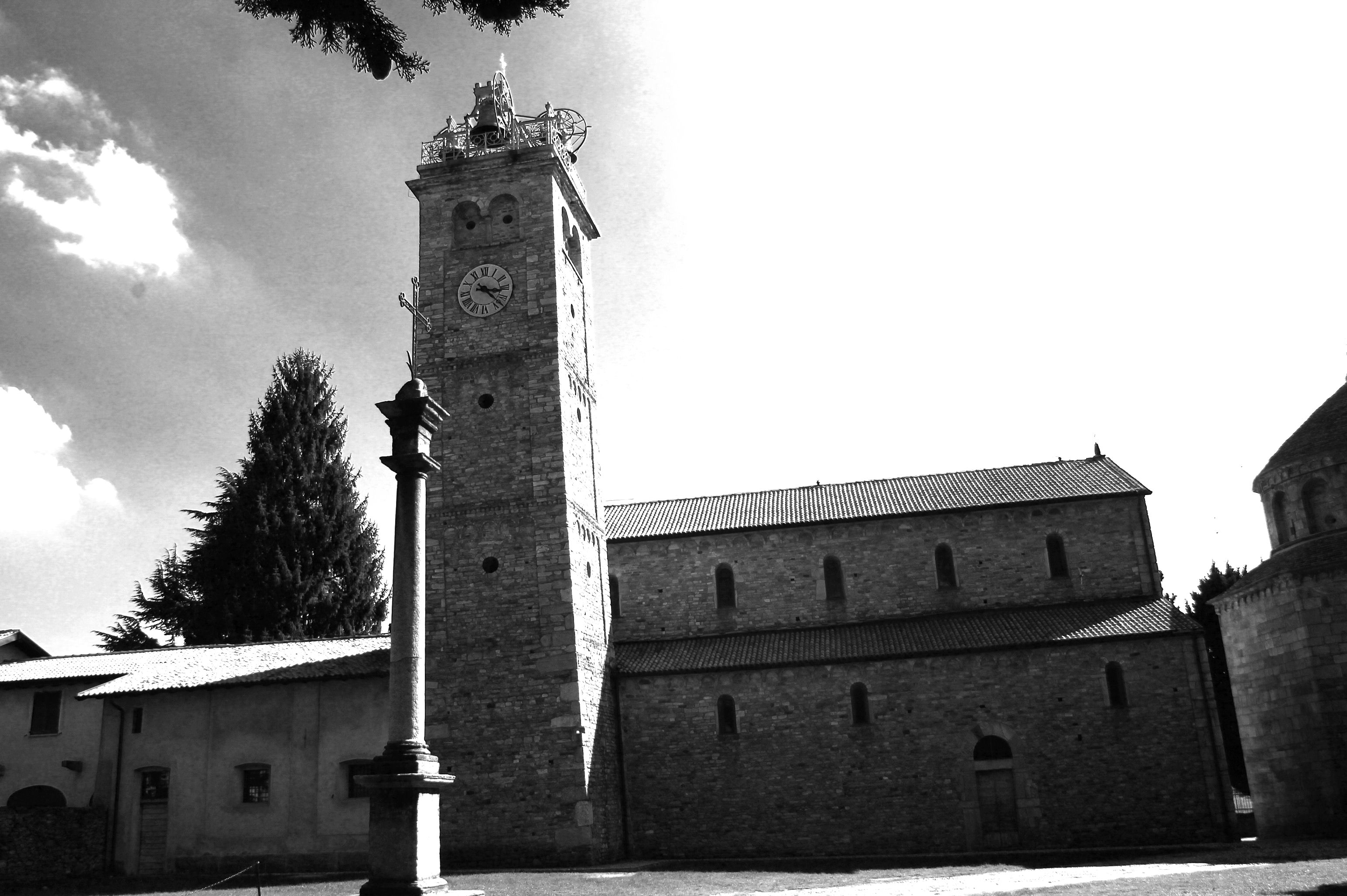 Basilica di San Vittore Martire This is a photo of a monument which is part of cultural heritage of Italy.